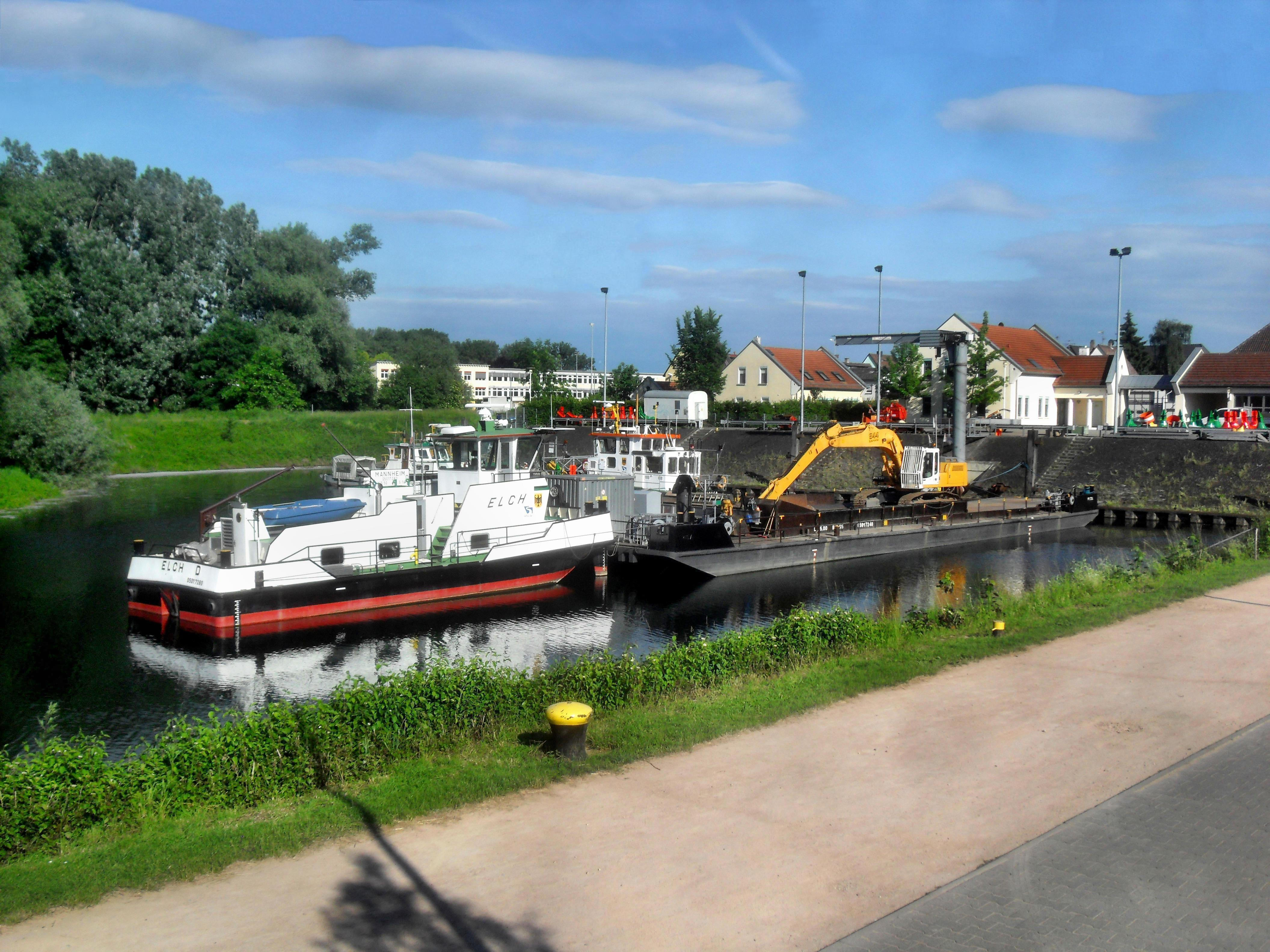 Der Oppenheimer Hafen mit Verbindung zum Rhein in Rheinhessen in Rheinland-Pfalz (Deutschland)